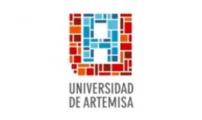 Logo Institucional de la Universidad de Artemisa